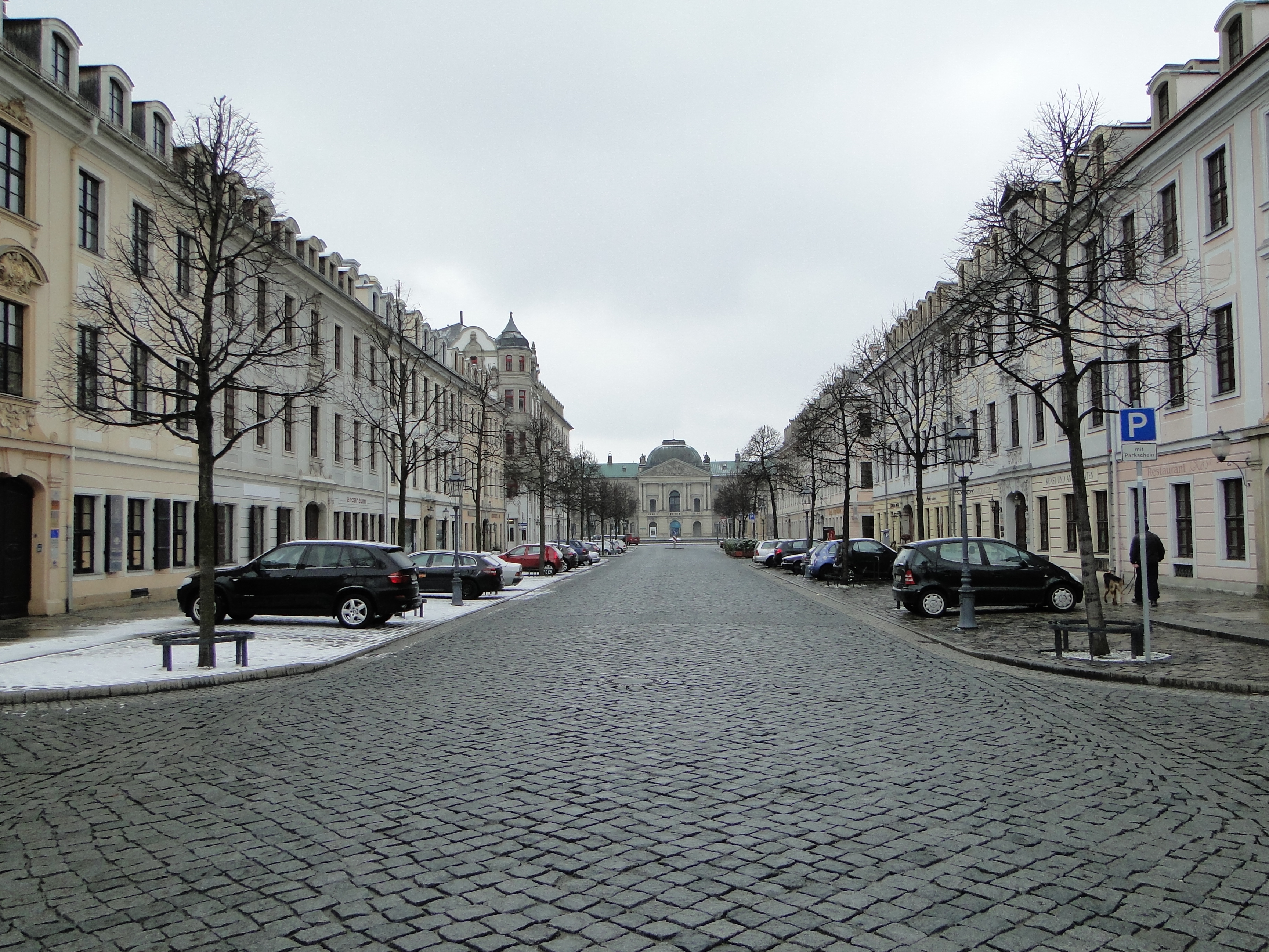 Dresden April 2013